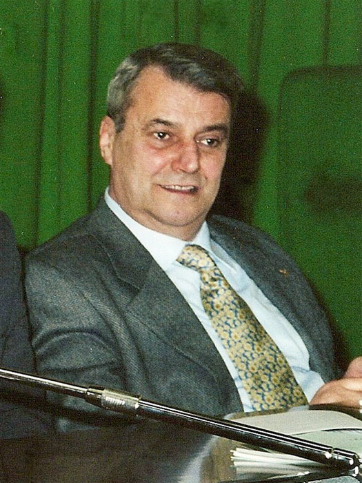 Angelo Bellettato, ca 2001, Padova